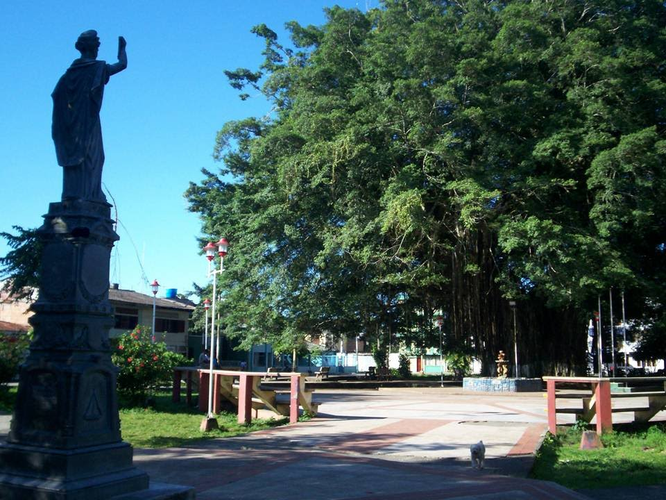 Parque Colon